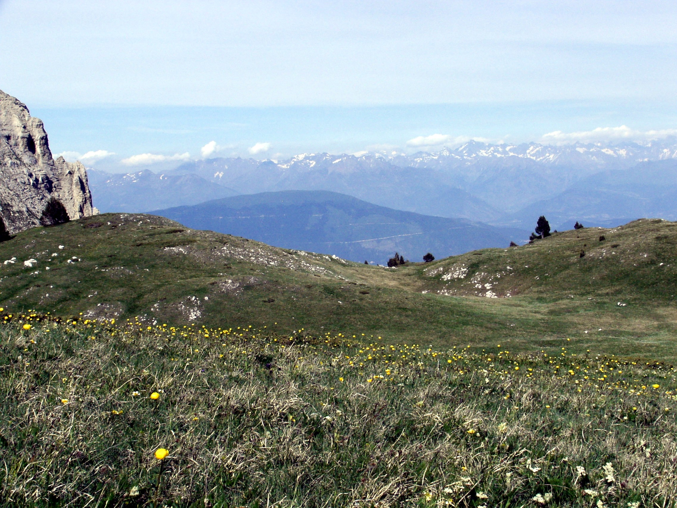 Hauts Plateaux du Vercors & Massif des Ecrins (France)